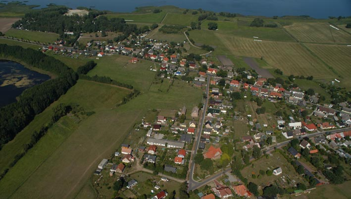 Grambin von oben